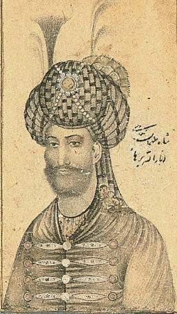 Şah Tahmasb I. ait bir minyatür (Shah Tahmasb I a miniatur)